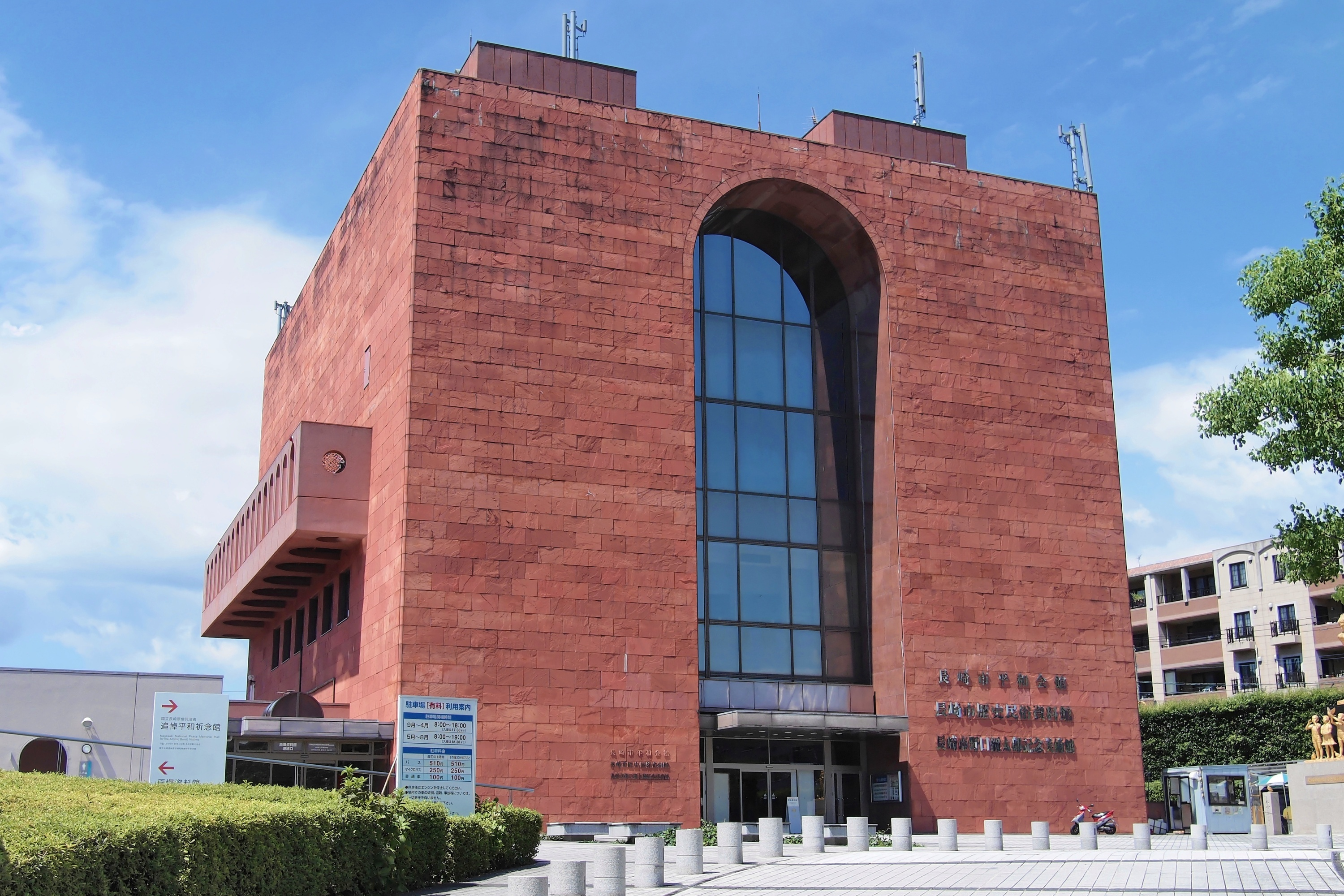 長崎市平和会館（長崎県長崎市）。